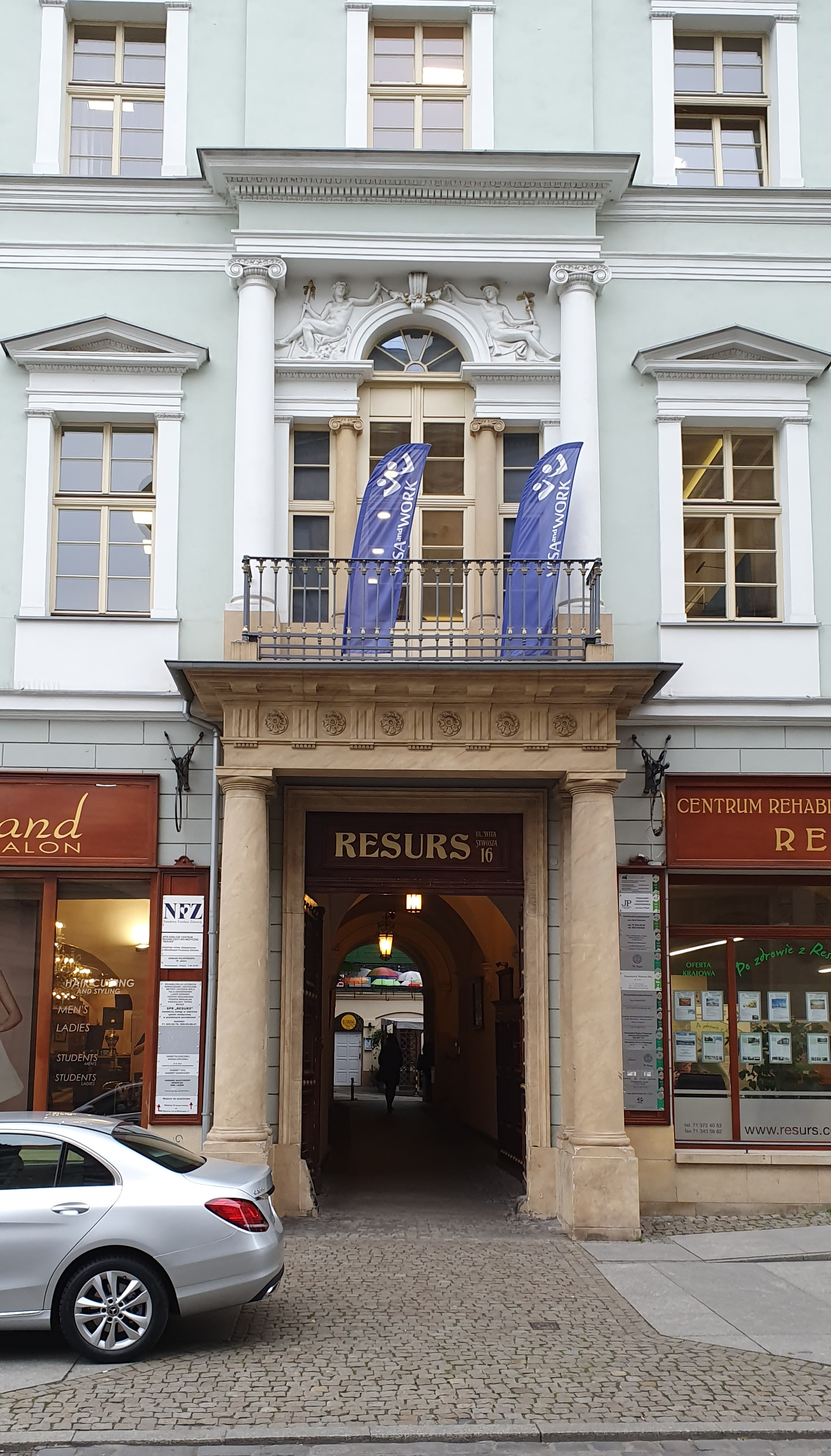 Kamienica przy Wita Stwosza 16 we Wrocławiu - portal balkonowy wejściowy